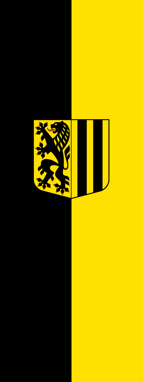 Stadtfahne von Dresden als Beispiel zur Illustration des Artikels Stadtfarben. Die Stadtfarben sind schwarz und gelb.